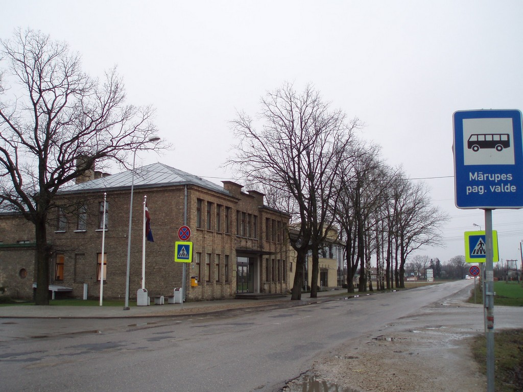 Mārupes pagasta padomes ēka.